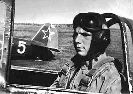 Yuri Gagarin como cadete del club de vuelo de Saratov